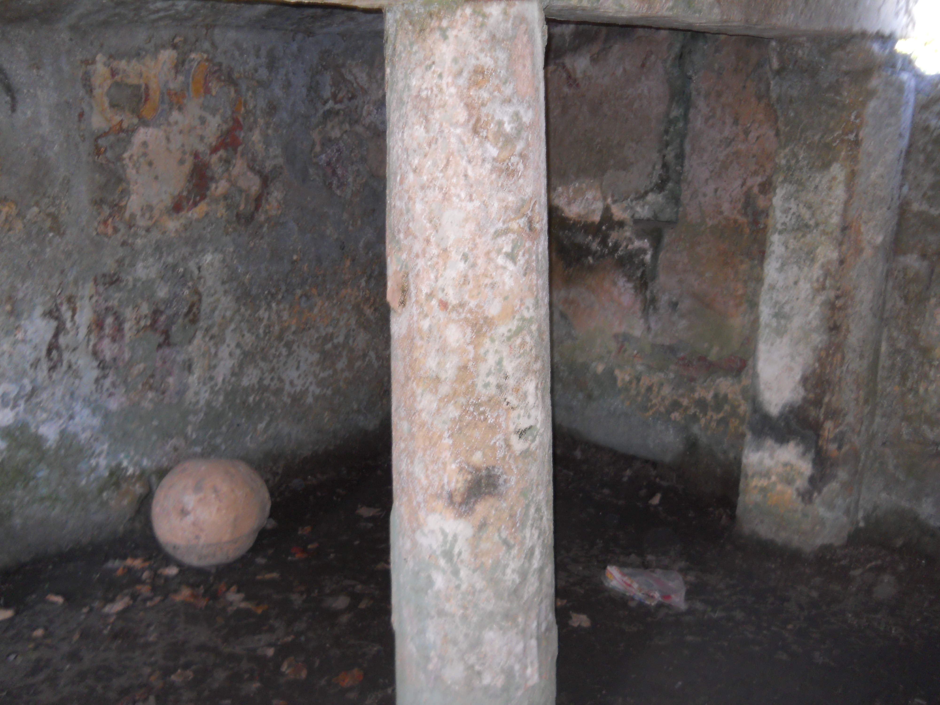 Interno del monumento funerario denominato "Centopietre" - Patù